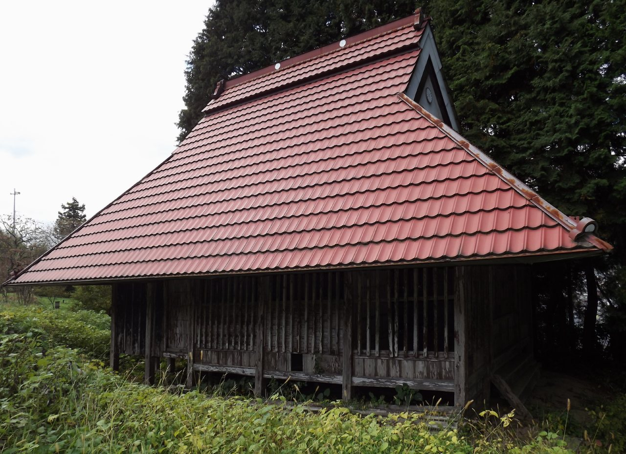 大宝寺の参道脇に建つ陵権現